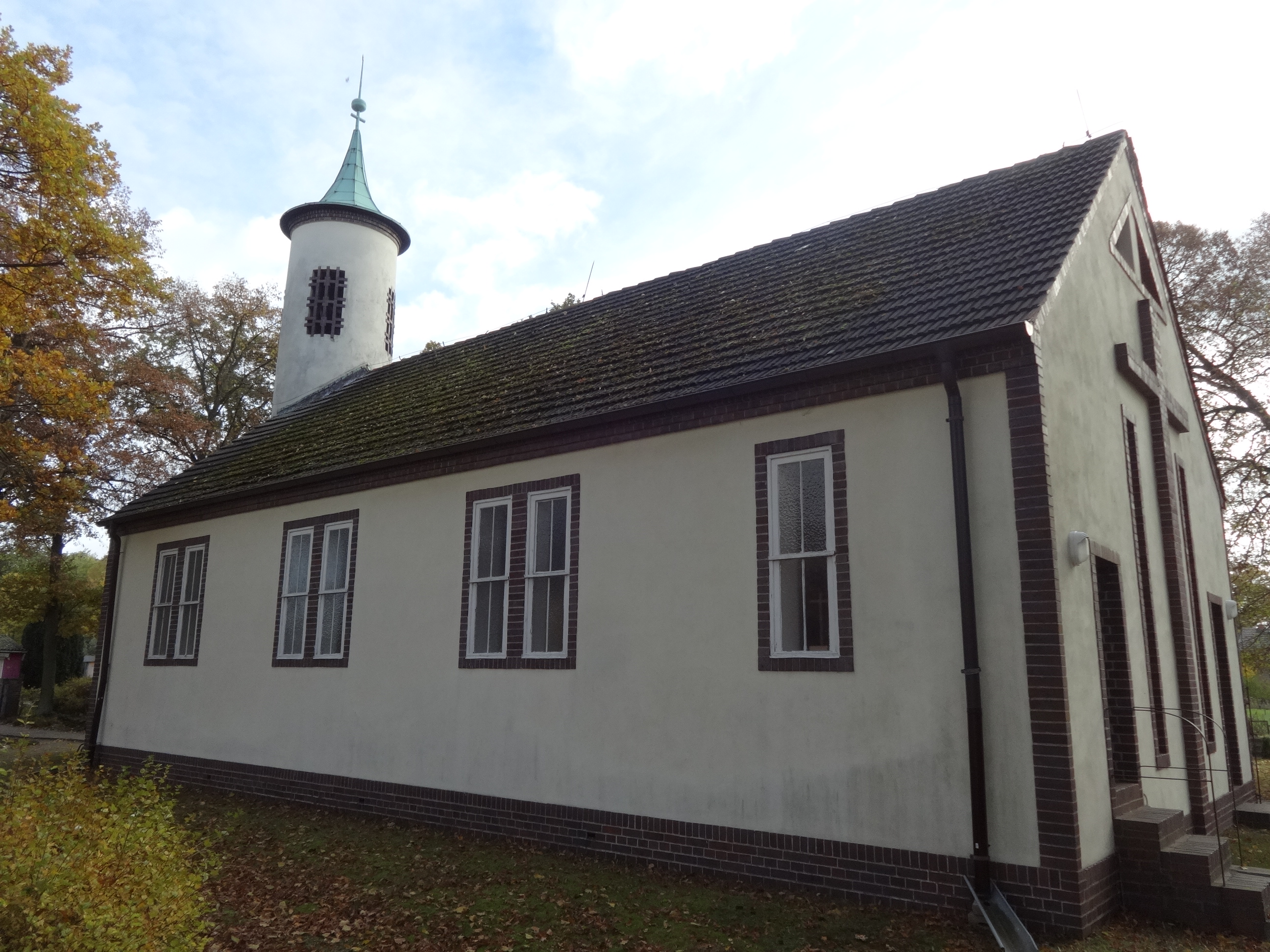 Die Dorfkirche Paulinenaue ist ein im Stil des ausgehenden Expressionismus errichteter Sakralbau, der in den Jahren 1931 bis 1932 unter der Leitung des Berliner Architekten Rettich entstand.